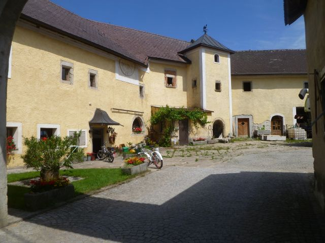 Schloss_Breitenbruck_Innenhof_mit_Turm